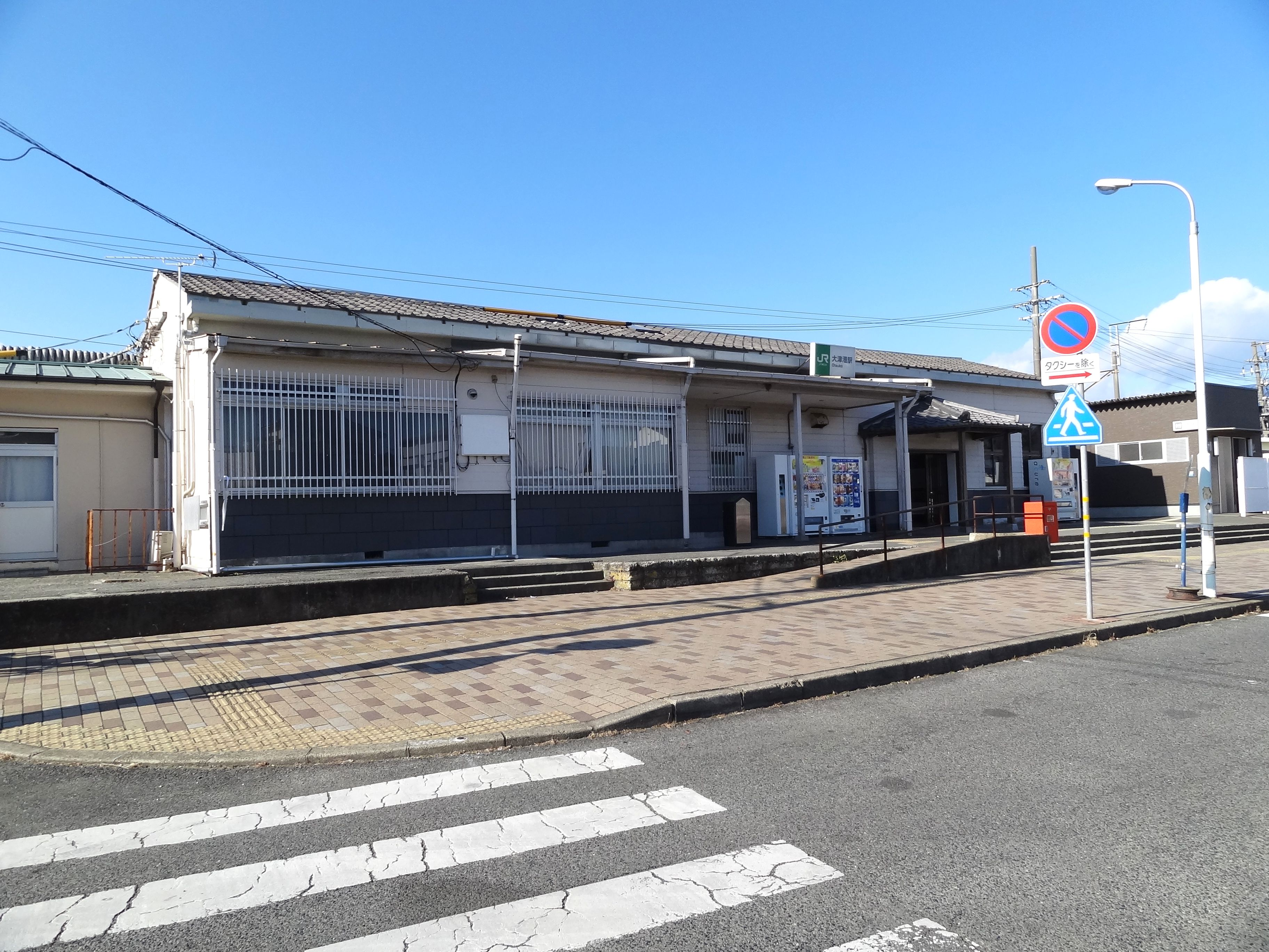 JR東日本・常磐線 大津港駅